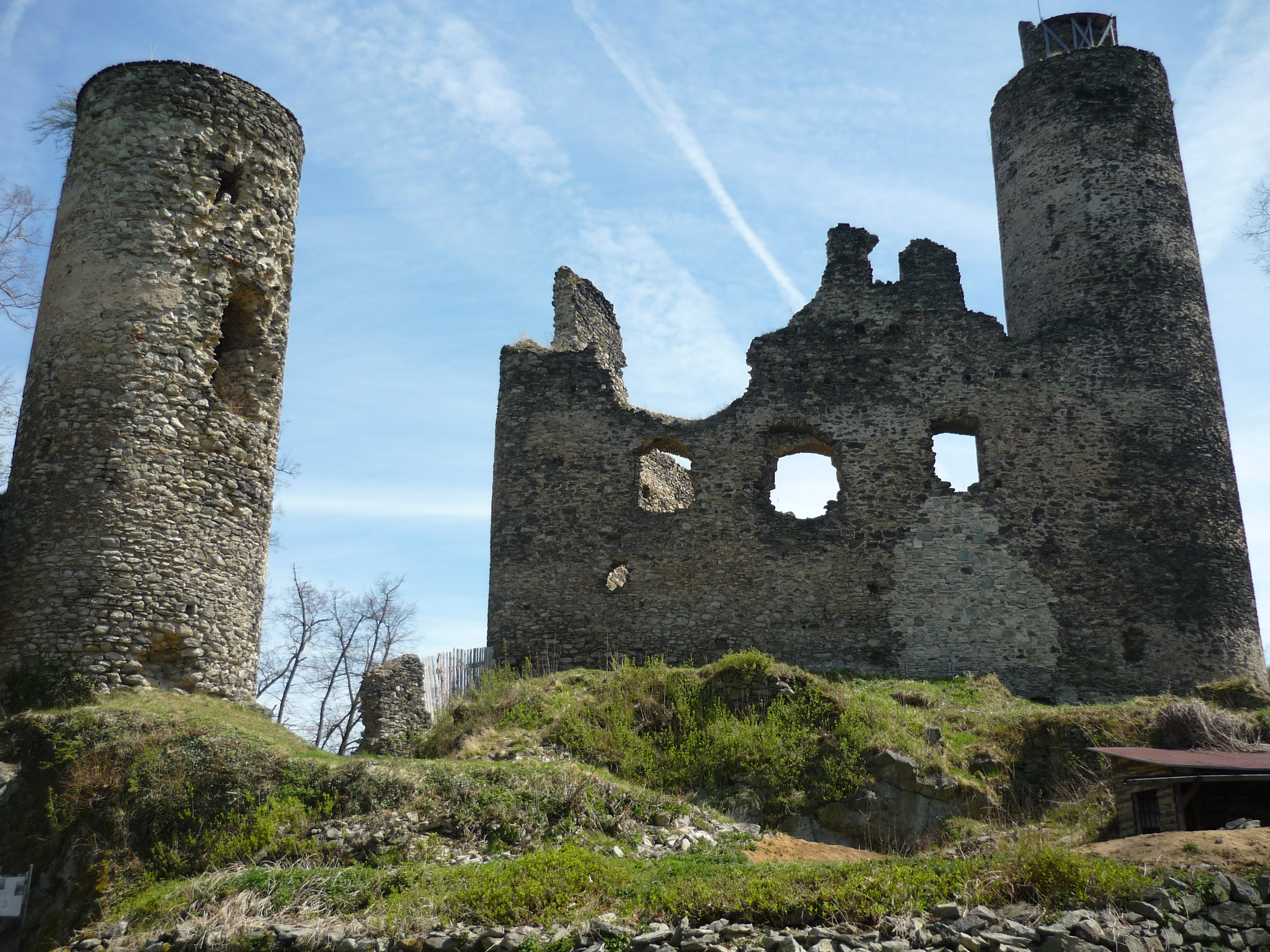 Hrad Kostomlaty pod Milesovkou